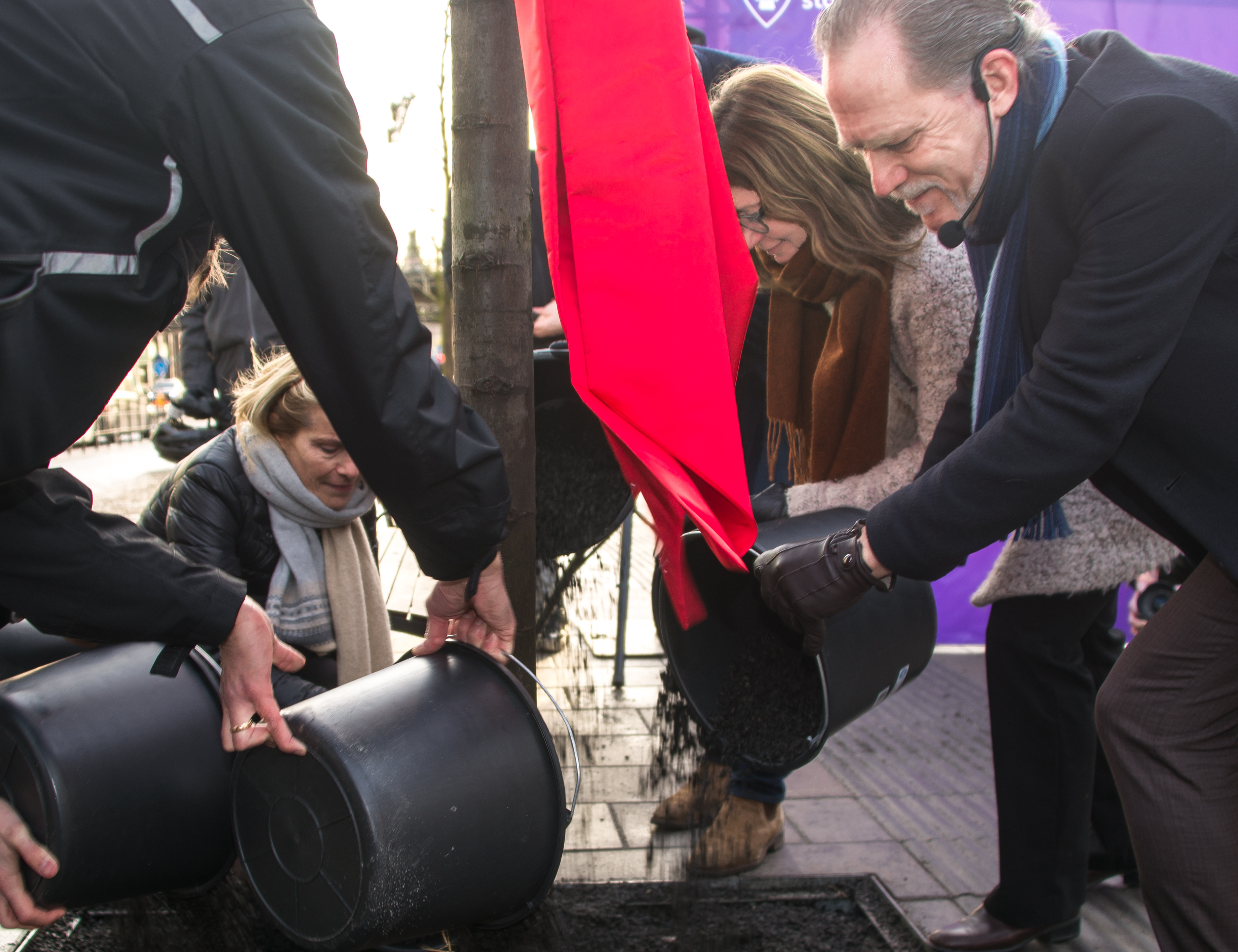 Stadsträdgårdsmästare Elisabeth Rosenquist Saidac, trafikdirektören Gunilla Glantz och trafikborgarrådet Daniel Helldén häller på biokol till silverlinden som är en av 67 träd som ska planteras längst Vasagatan och göra gatan mer välkomnande, grönare och tryggare.